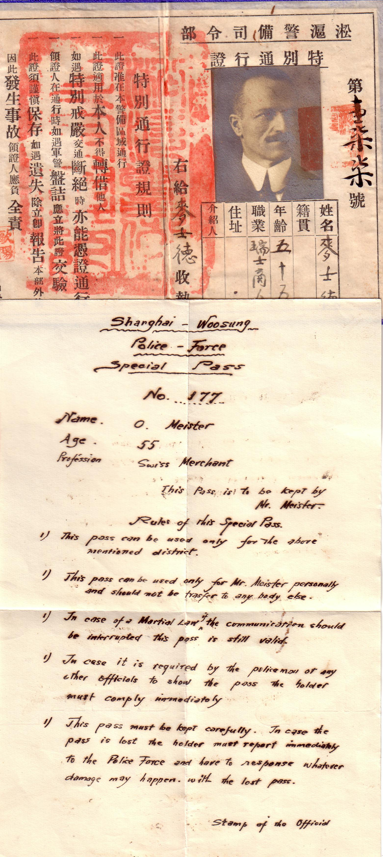 Lasciapassare (Special Pass) Cinese ottenuto dall'ingegner Otto Meister durante i suoi viaggi in Cina. Il lasciapassare gli consentiva accesso a determinati distretti di Shangai e Wusong